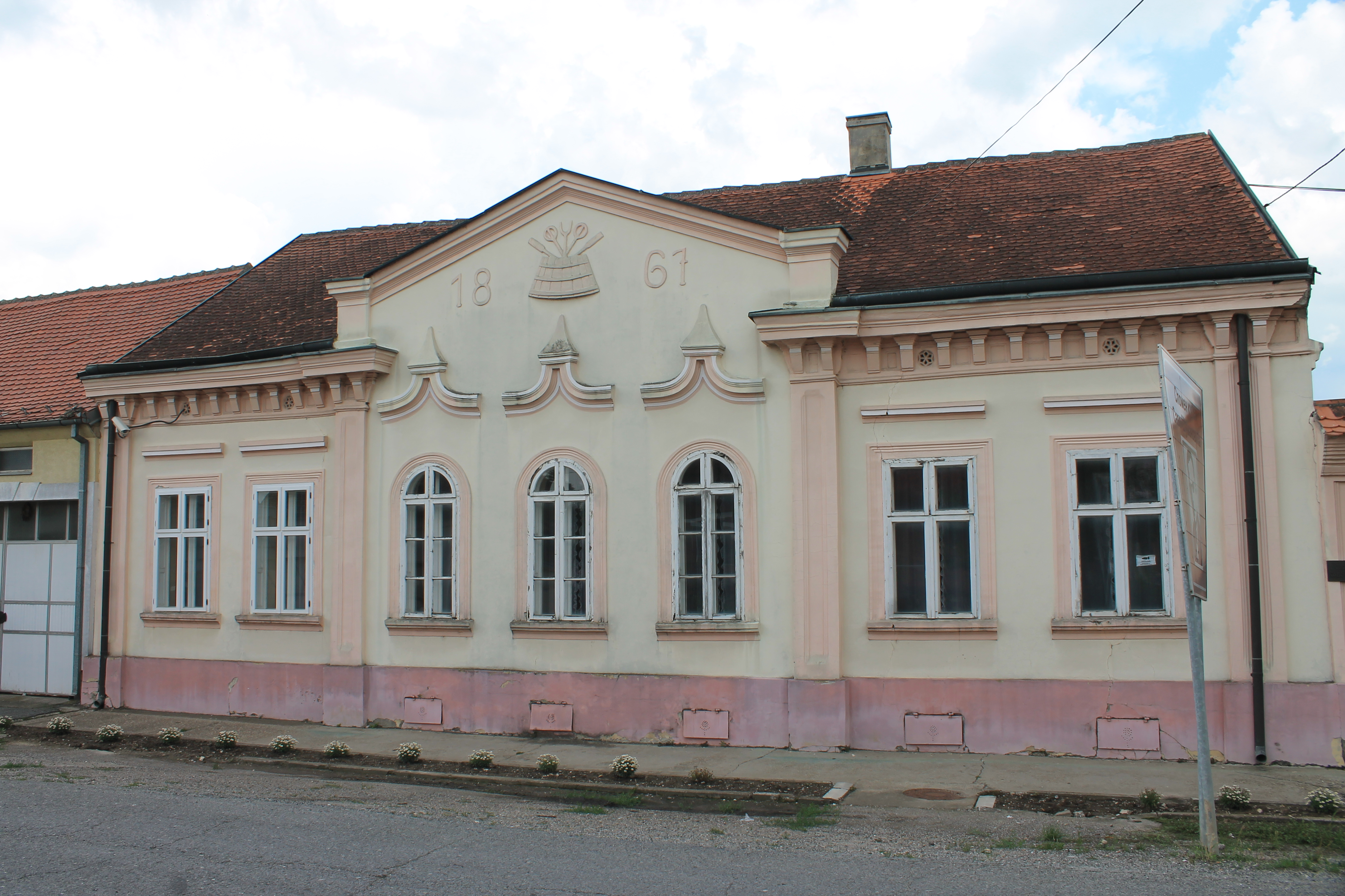 Kuća Save Šumanovića